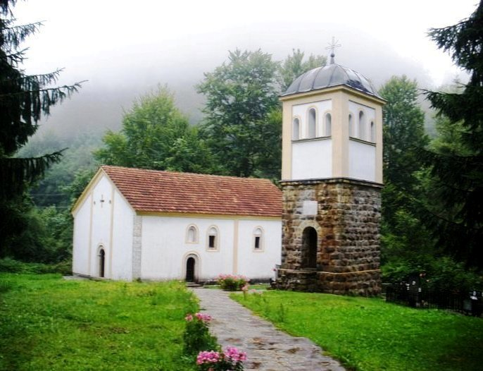 Снимак: Радосав Стојановић